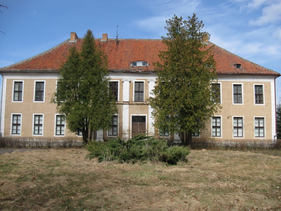 Ponary - pałac, XVII, XIX